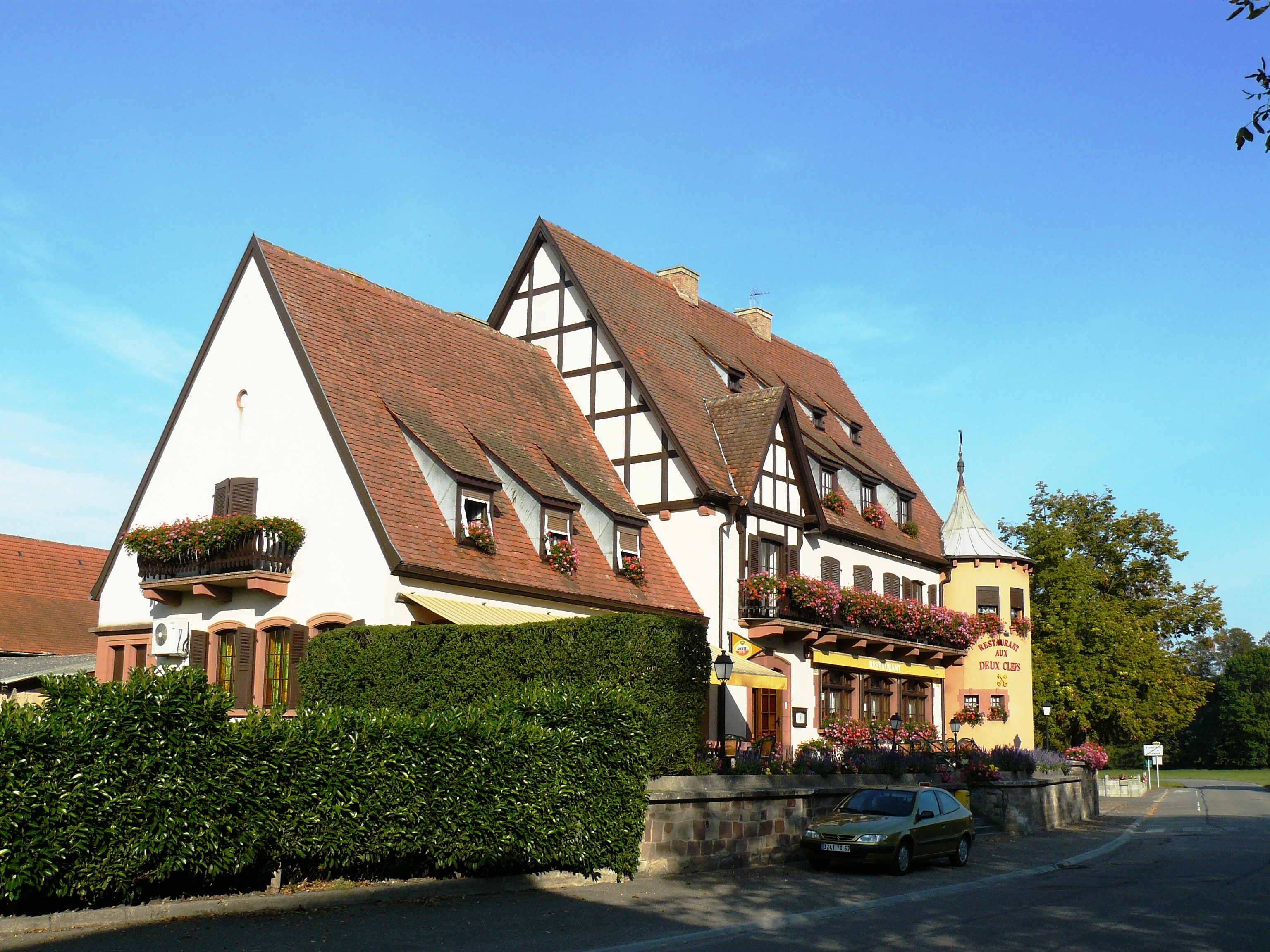 Restaurant des deux clés à Neunkirch magnifiquement fleuri